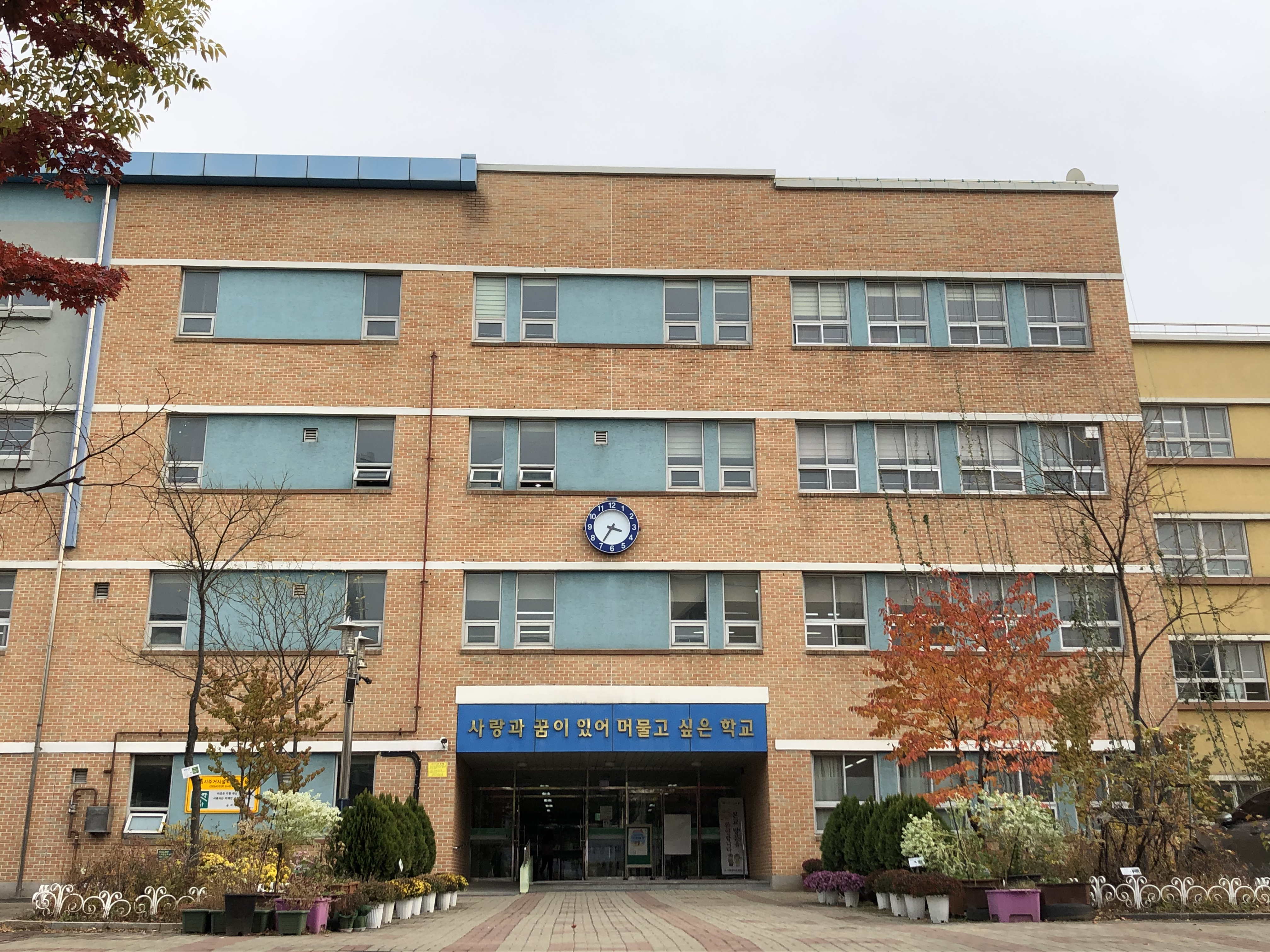 서울중대 초등학교